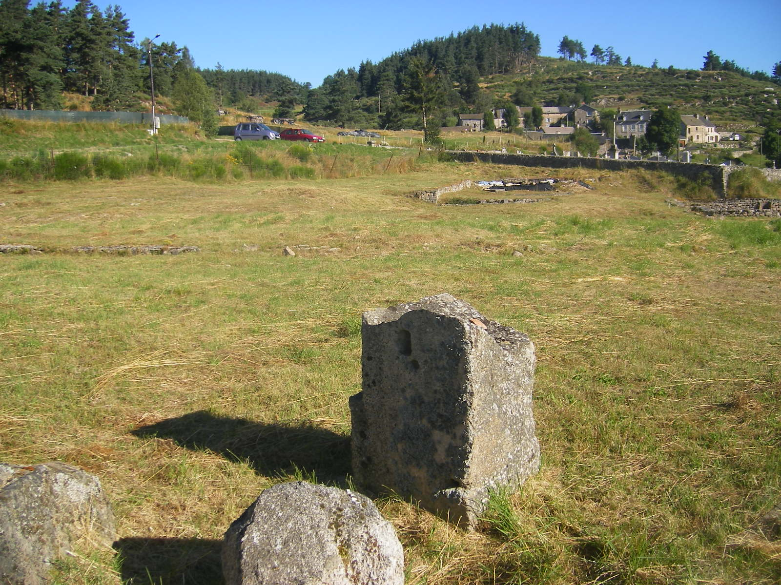 Javols - réserve archéologique Vestiges de la « domus Peyre »